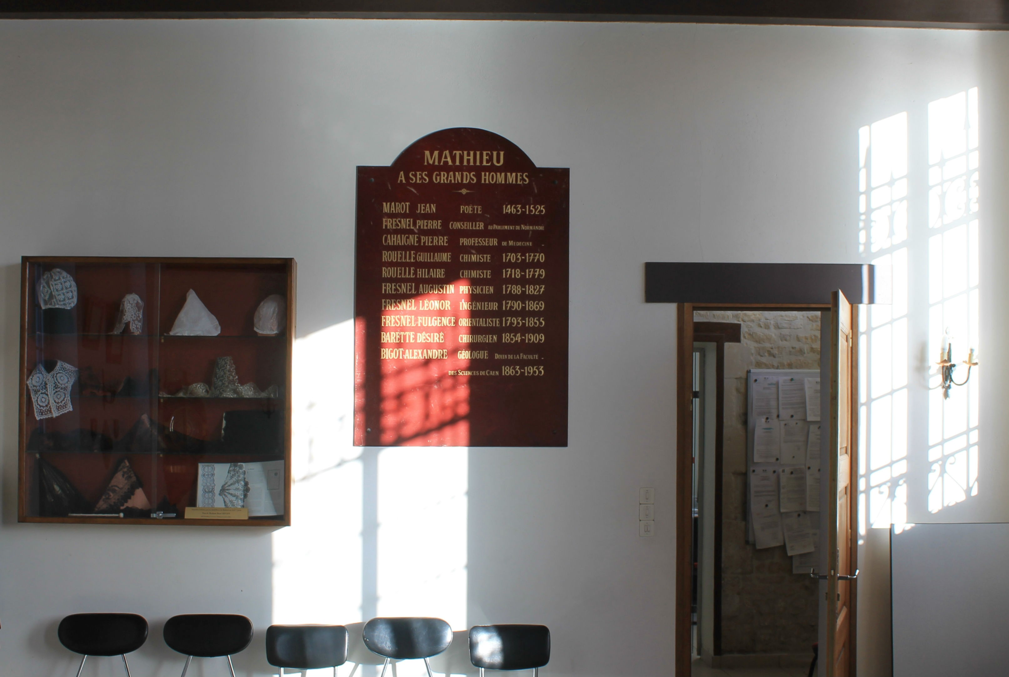 Plaque dans la salle de réception de la mairie de Mathieu (Calvados) Mathieu à ses grands hommes.